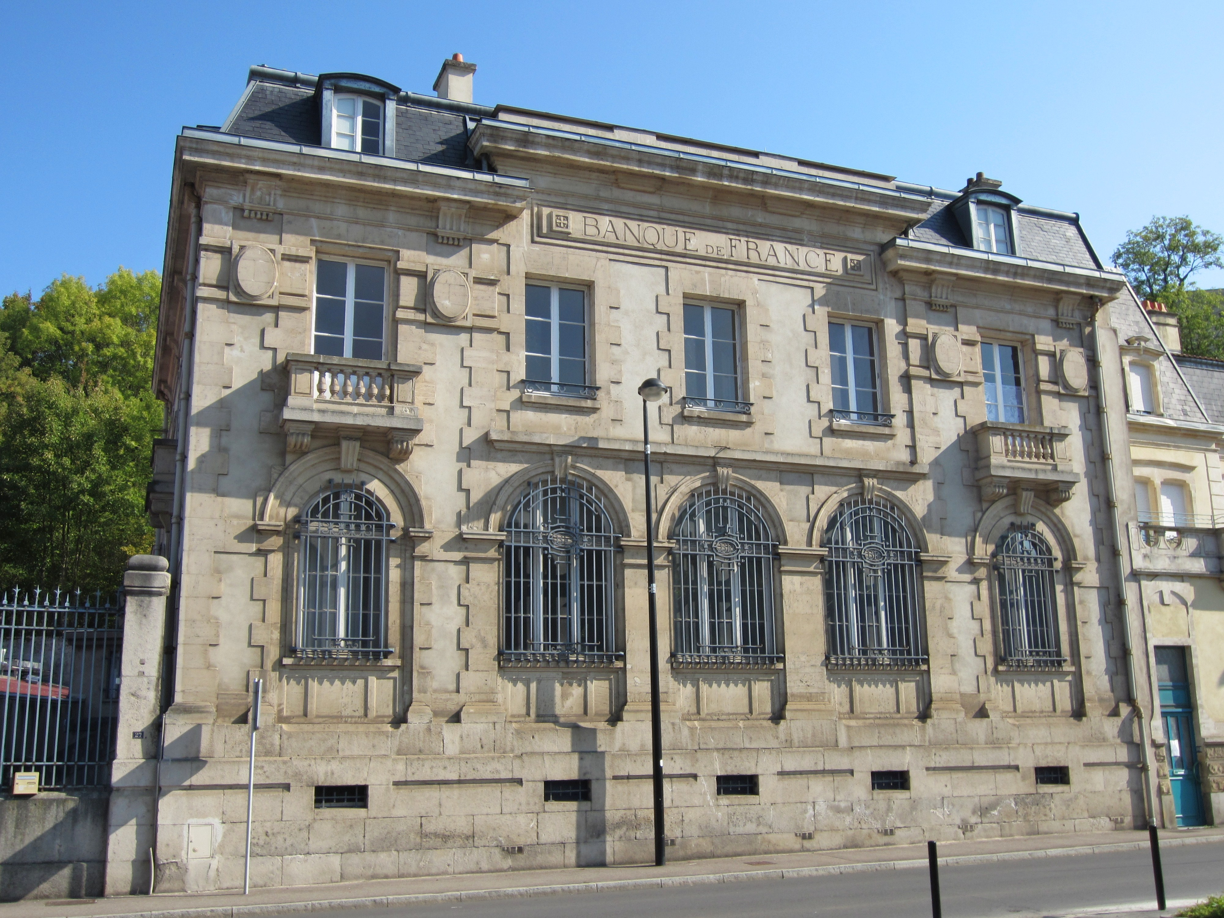 Description banque de france Briey Date4 January 2012Sourcemon appareil photoAuthorAimelaimePermission (Reusing this file) banque de france Briey